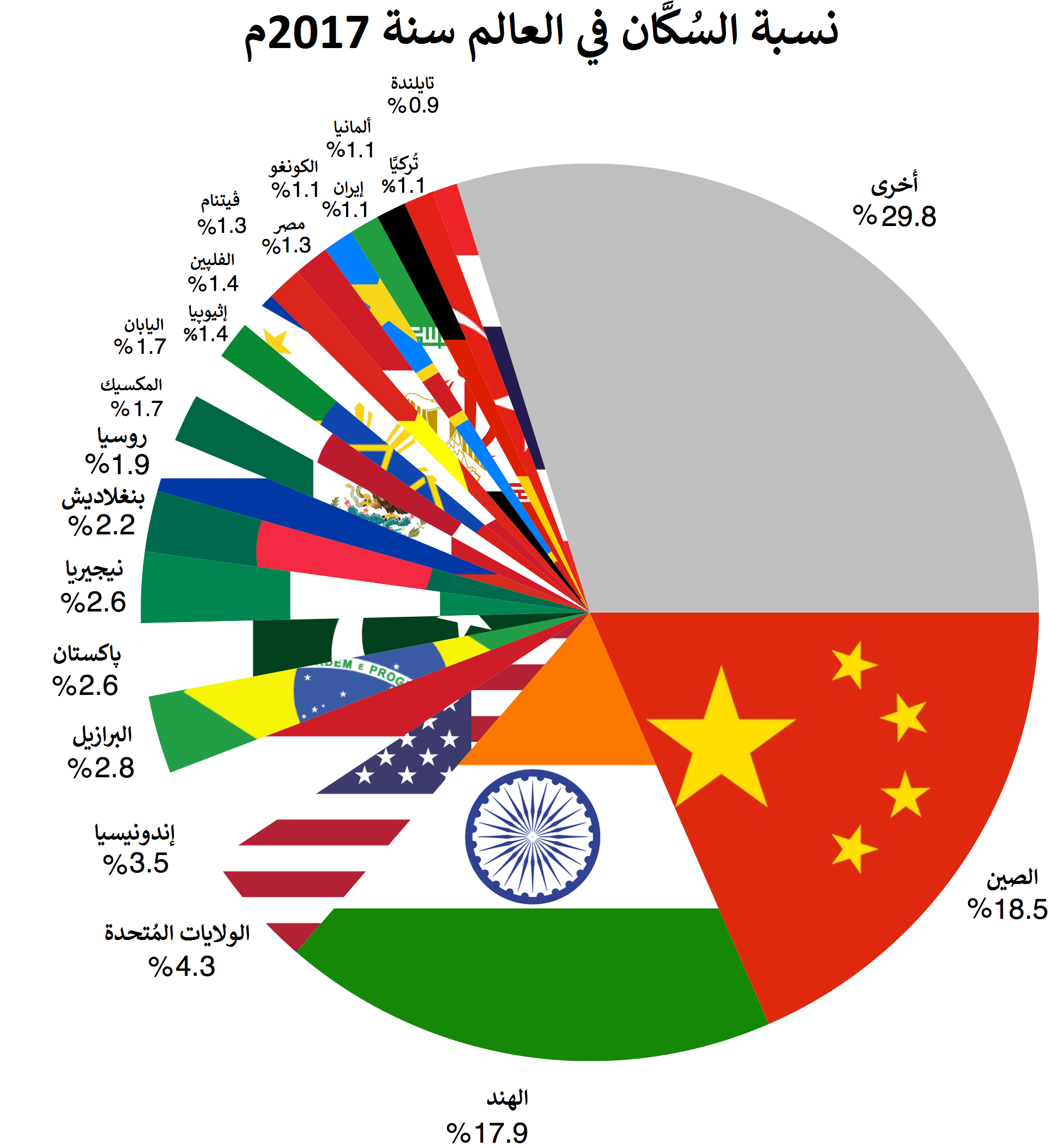 نسبة السُكَّان في العالم سنة 2017م وفق بعض الدُول.